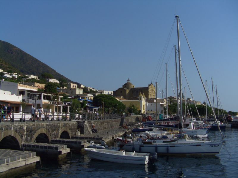 Salina, Sicilia, Italia